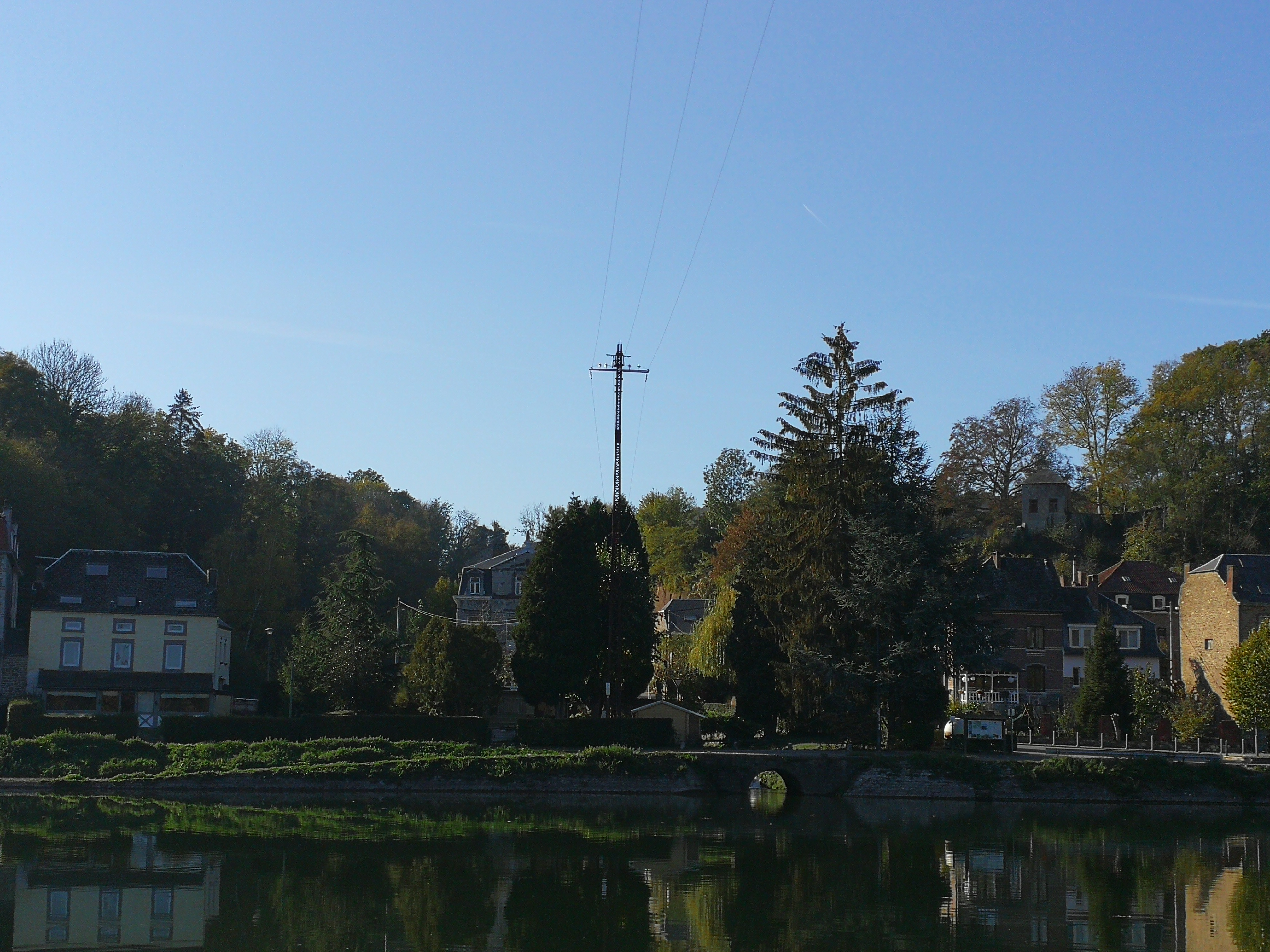 Pylône autrefois utilisé pour le passage d'eau sur la Meuse entre Rouillon et Godinne. Il est sur la rive droite de la Meuse, à Rouillon. Aujourd'hui, ce pylône et un autre identique sur la rive droite sont aujourd'hui utilisés comme support pour une ligne à haute tension. This photo of immovable heritage has been taken in the Walloon Region